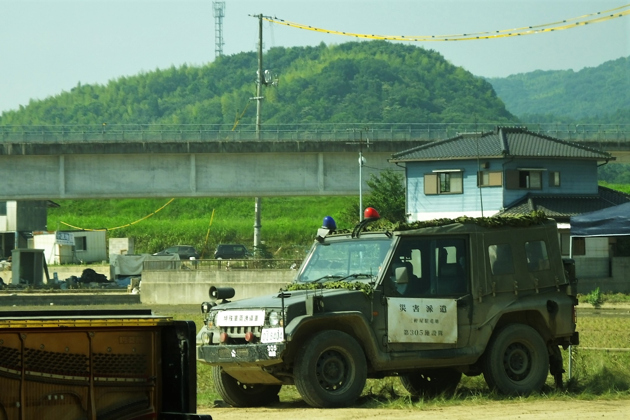 2018-07-14 Floods of Mabi, Kurashiki City 倉敷市真備 平成30年7月豪雨被害